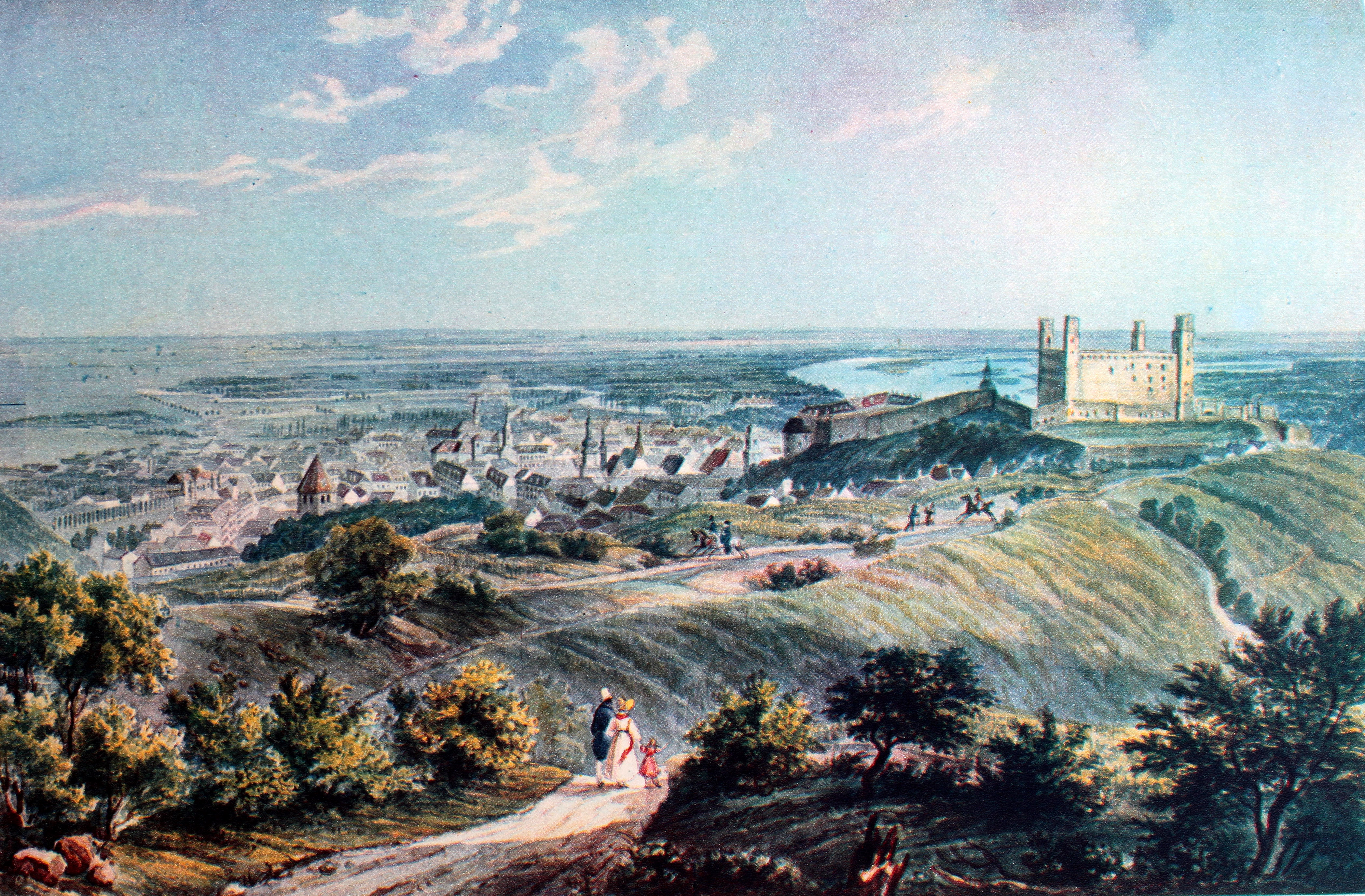 Bratislava